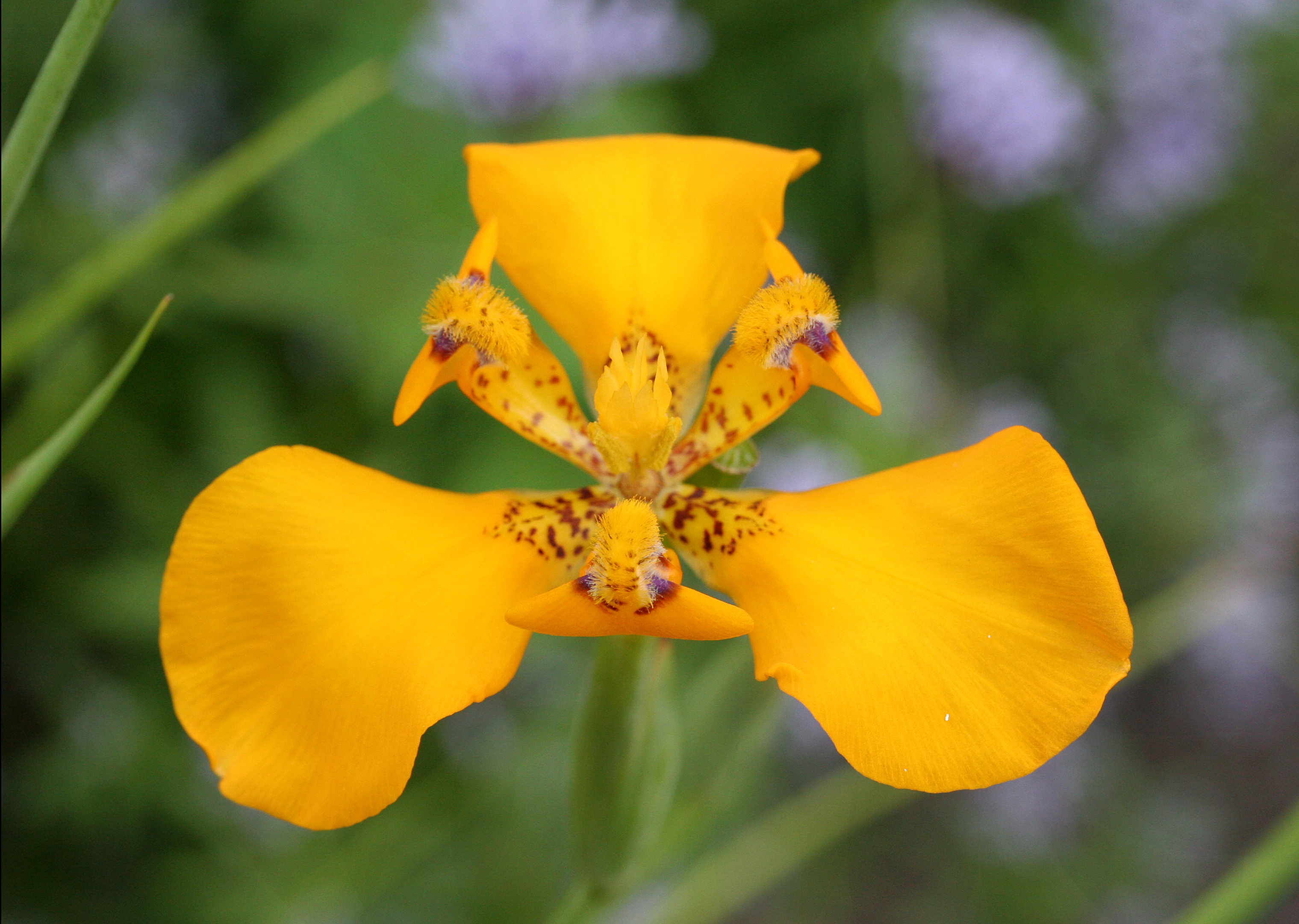 Cypella peruviana